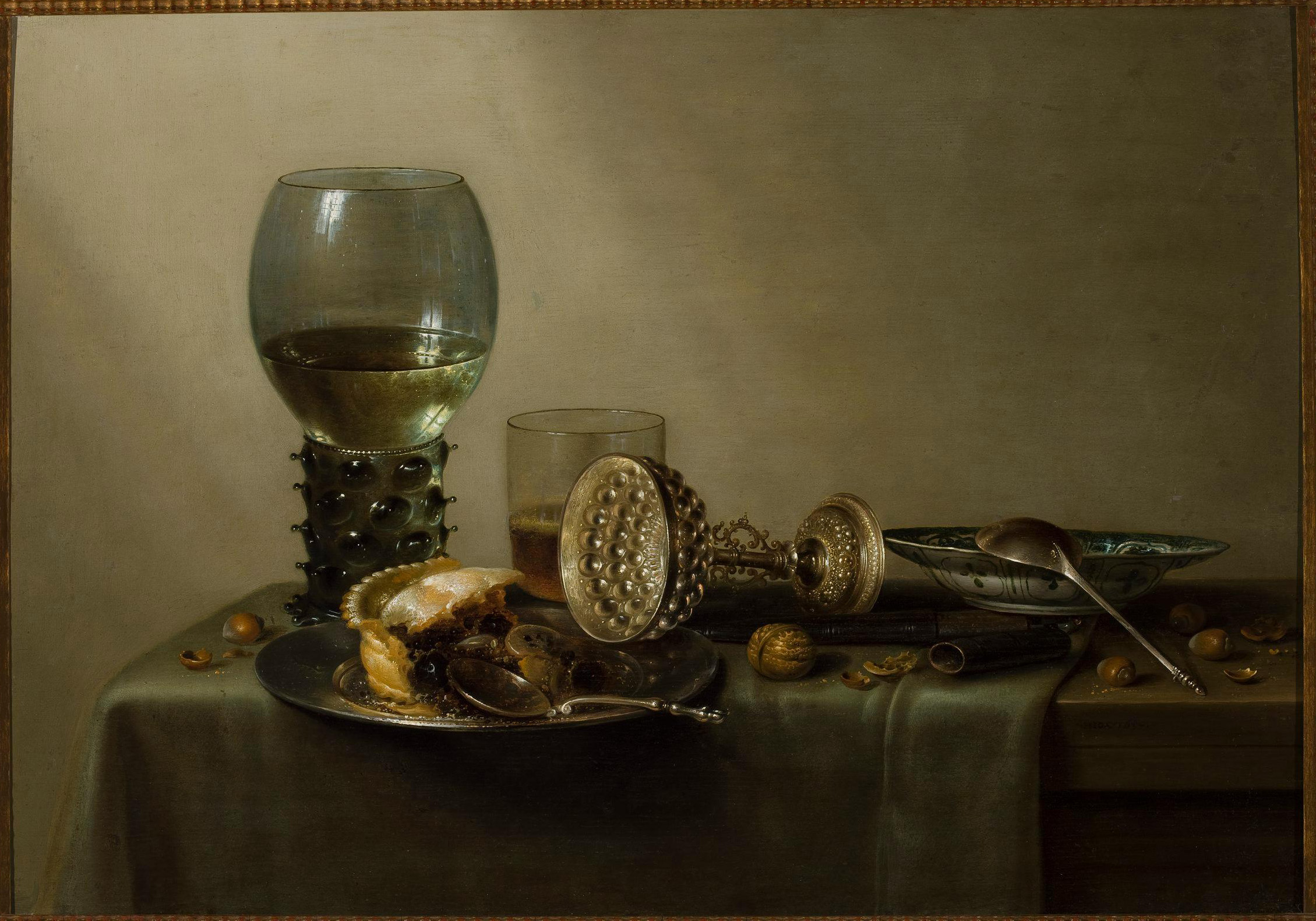 Deser - martwa natura z ciastem, winem, piwem i orzechami